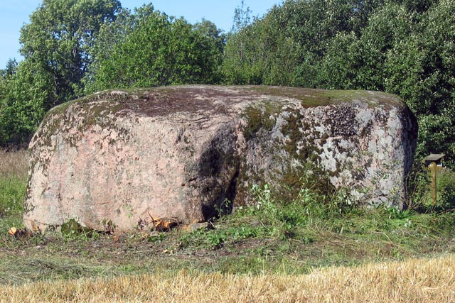 Vaharu rändrahn